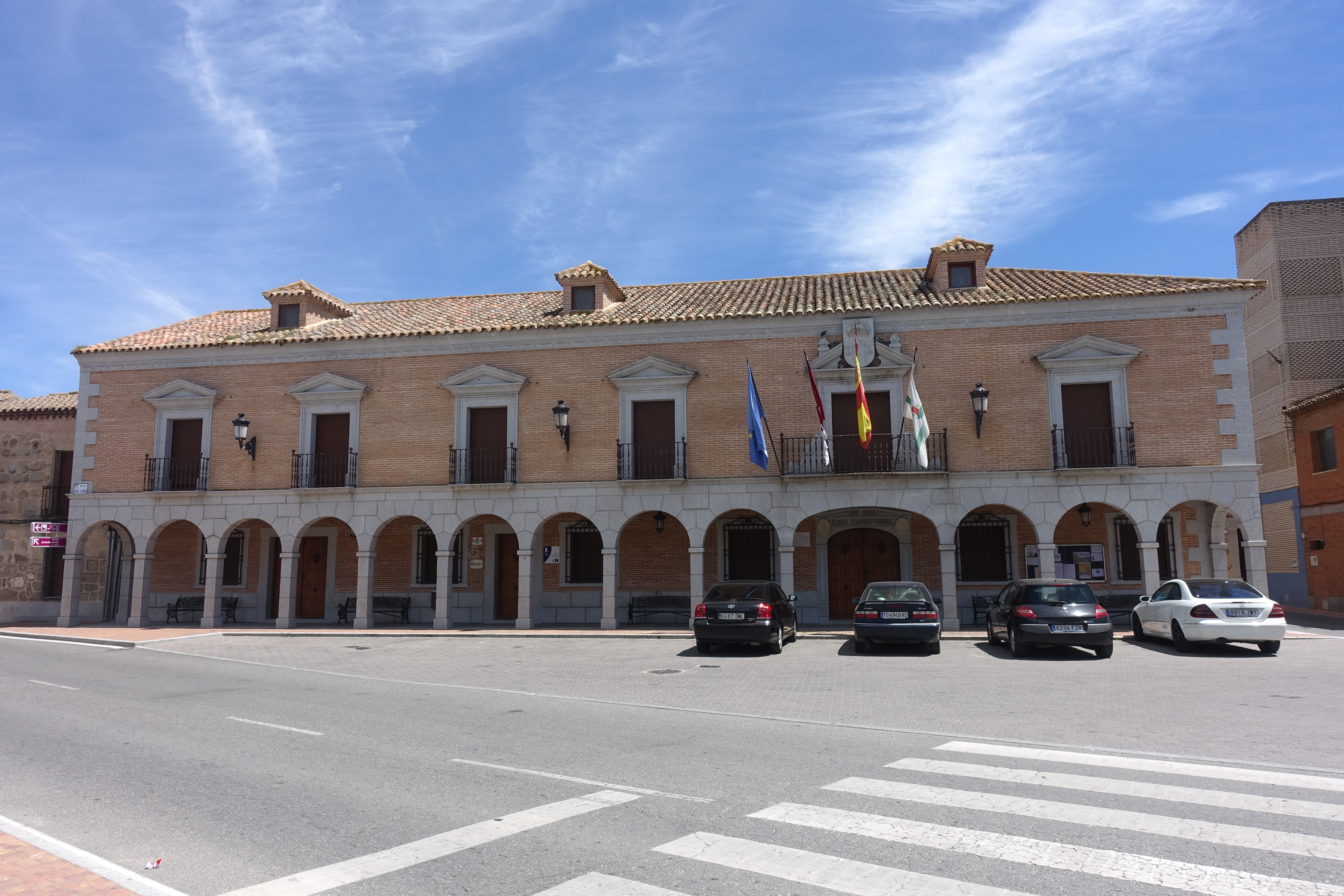 Casa consistorial de Cuerva (Toledo, España).